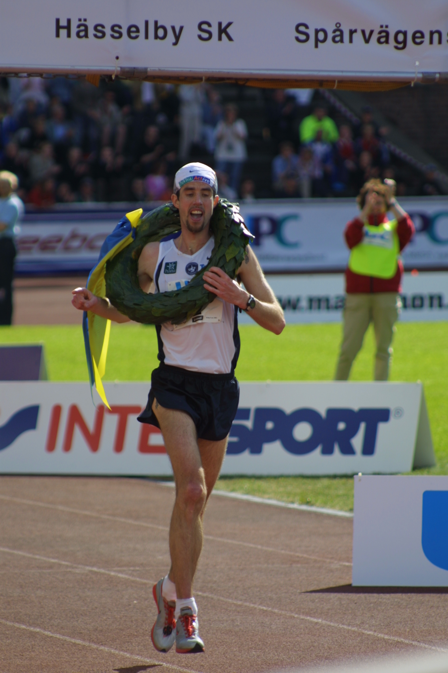 Stockholm Marathon 2001